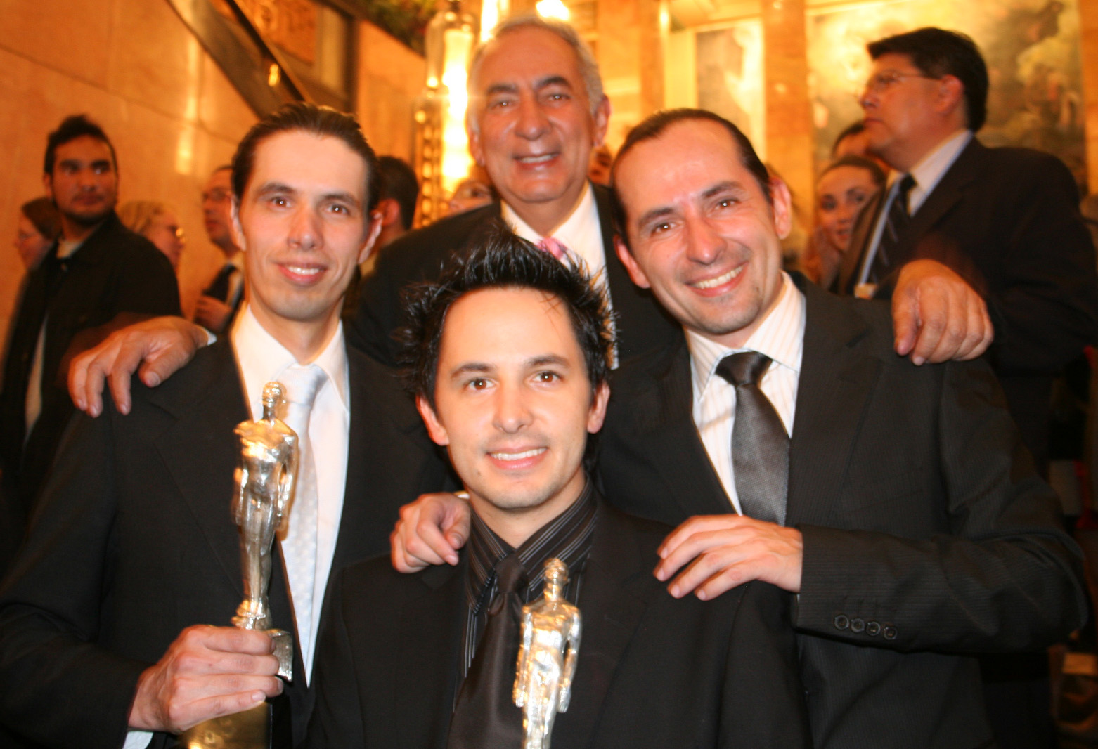 Los fundadores de Huevocartoon en la ceremonia de los premios Ariel